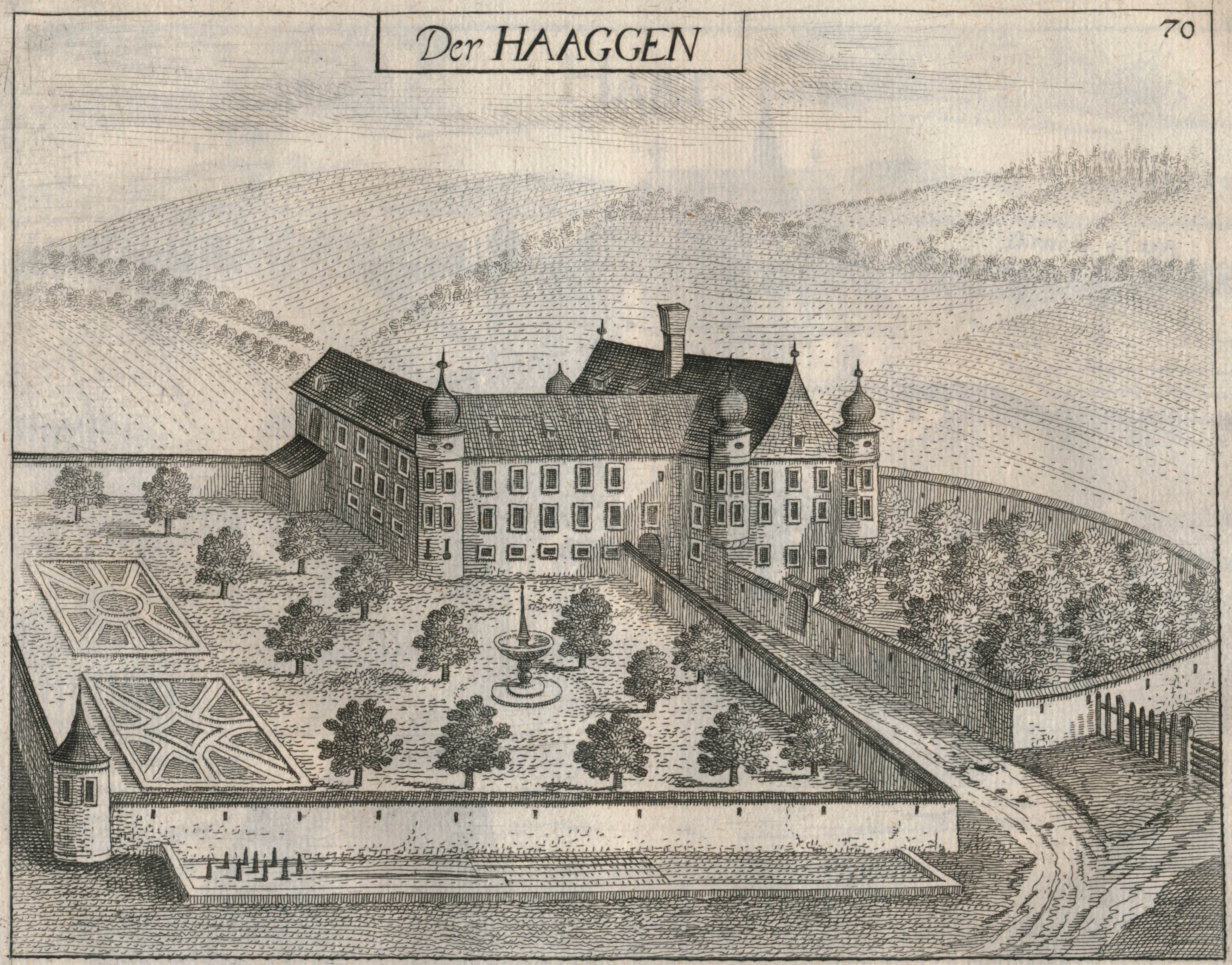 "Der Haaggen" zeigt das ehemalige Schloss Hagen in Linz, Österreich